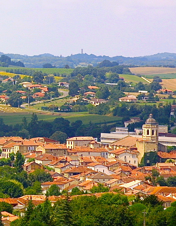 Vic-Fezensac vue du ciel